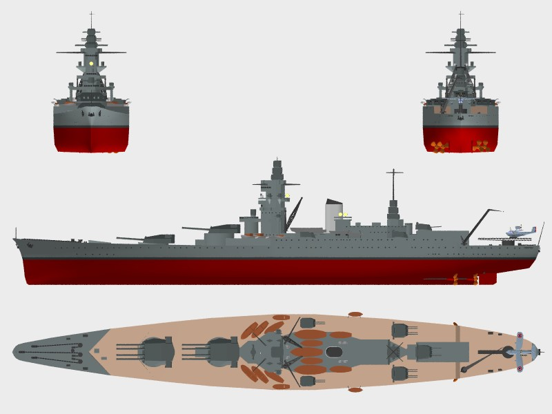 Plan général du croiseur de bataille Dunkerque (1935, France), modèle 3D simple créé avec POV-Ray.